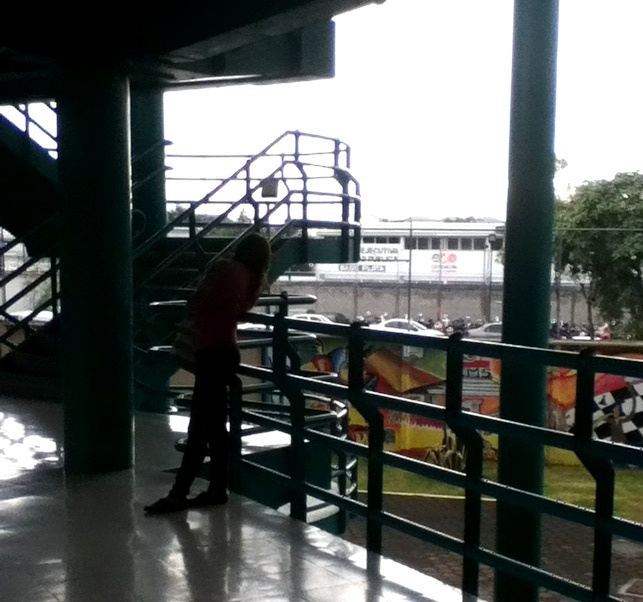 Sistema de Bachillerato del Gobierno del Distrito Federal. Instituto de Educación Media Superior (IEMS)